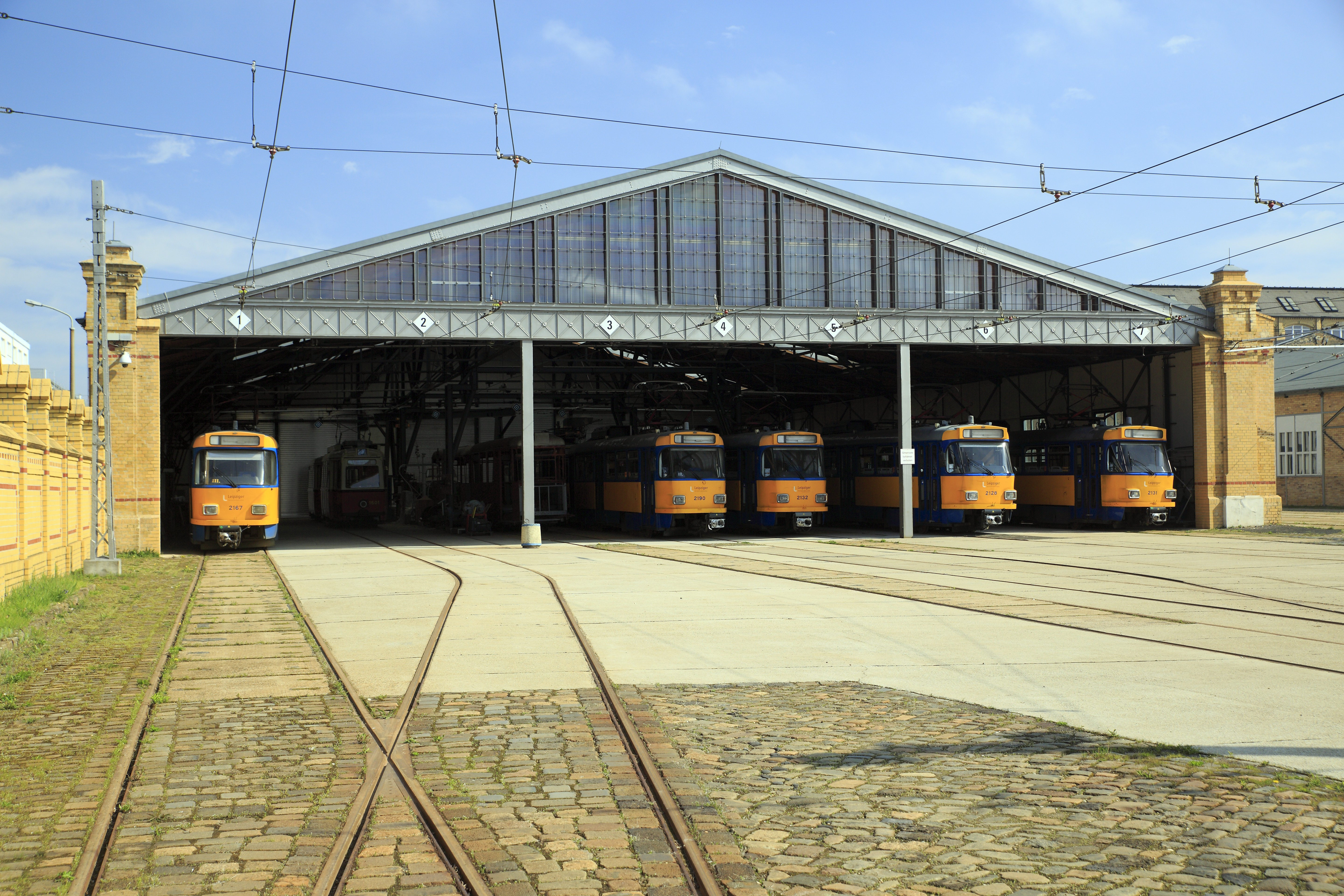 Von der Wittenberger Straße vor dem Umzug der Museumsbestände, zwischenzeitlich wurde die für die Museumsnutzung vorbereitete Halle I zum Abstellen von Reservewagen des Typs 33c genutzt. Der Gleisabstand wurde vergrößert, zu Betriebszeiten gab es neun Hallengleise.